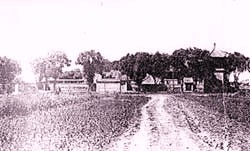 邱宅血案現場